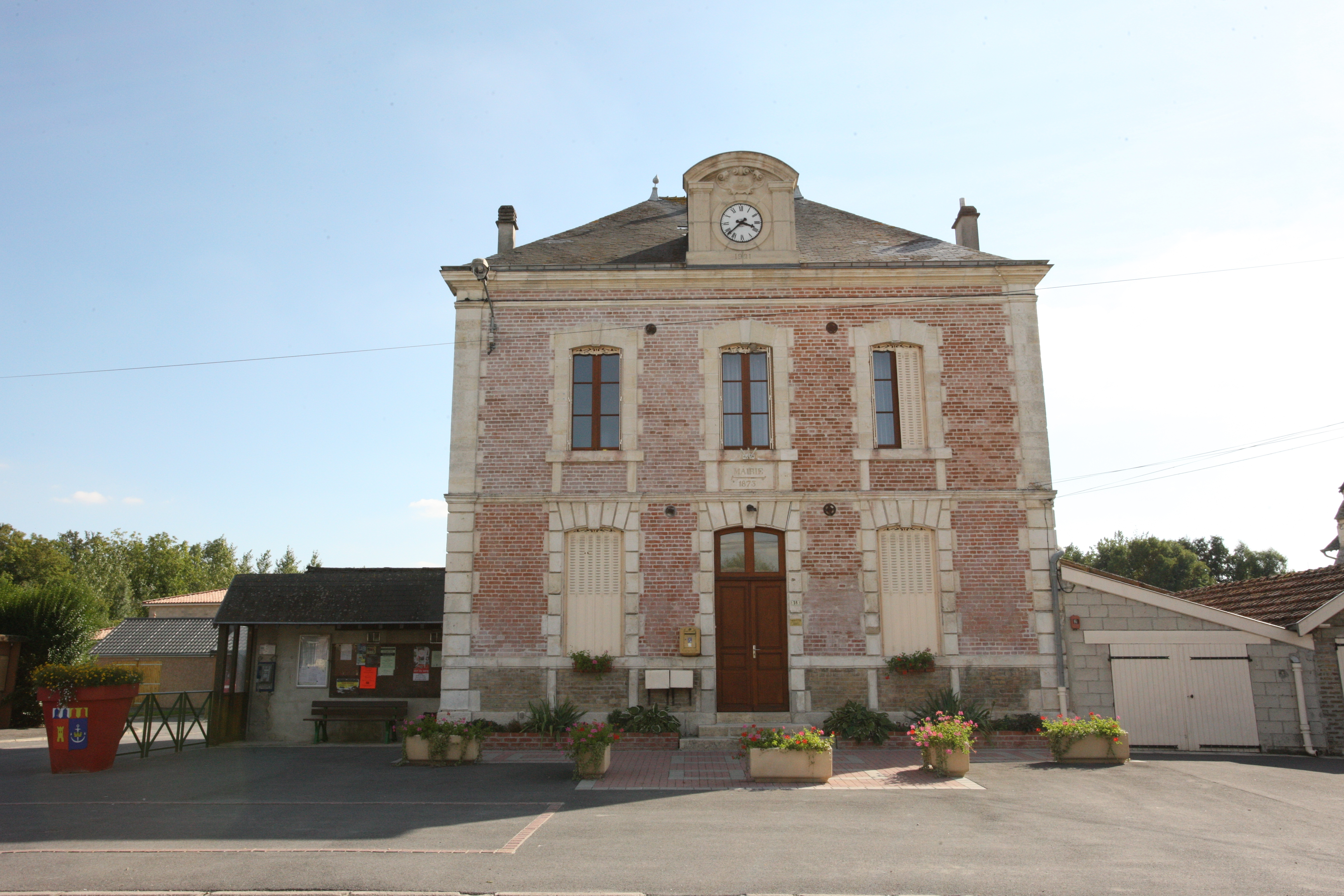 Village Ardennais